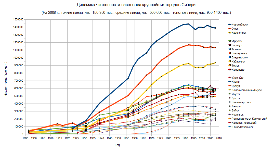 Динамика численности населения крупнейших городов Сибири. На 2008 г.: тонкие линии, нас. 150-350 тыс.; средние линии, нас. 500-600 тыс.; толстые линии, нас. 950-1400 тыс.